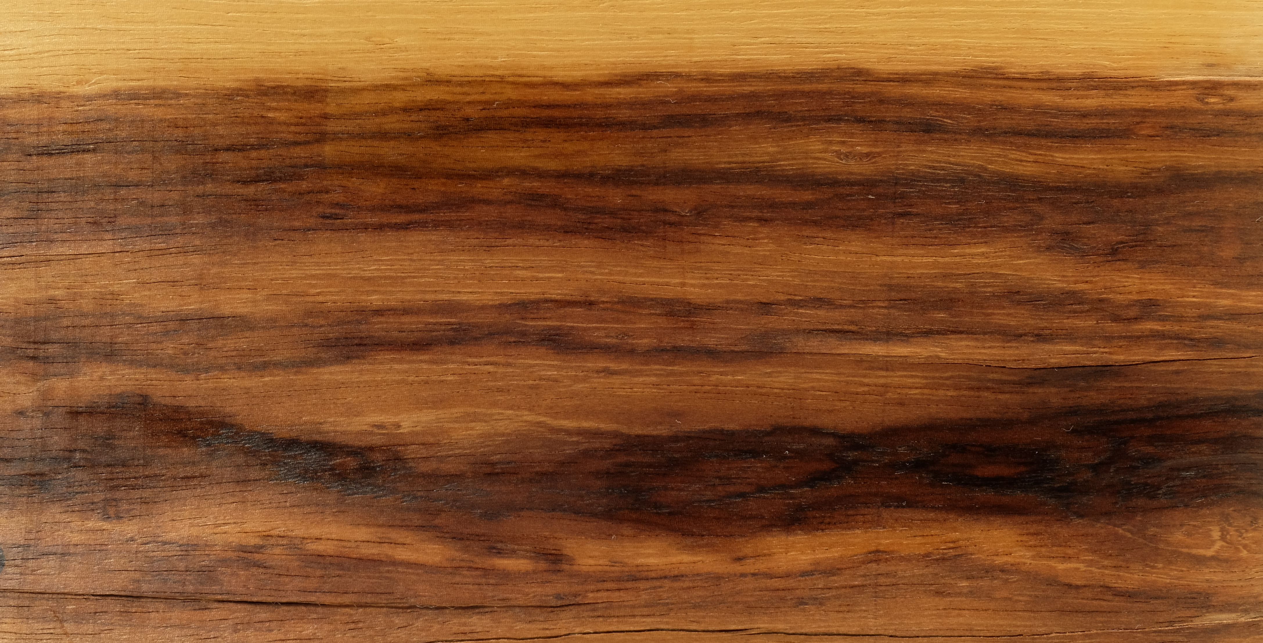 gemessertes Furnier; Holzart: Saburana-Palisander